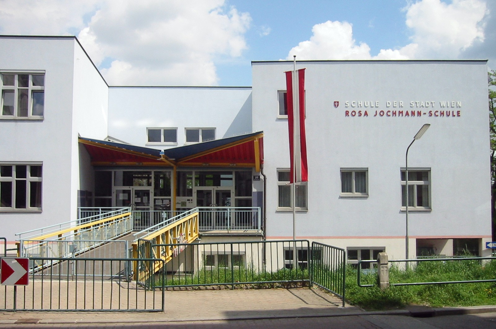 Rosa-Jochmann-Schule in Wien-Simmering, entworfen vom Architekten Hermann Czech